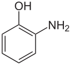 Aminofenol